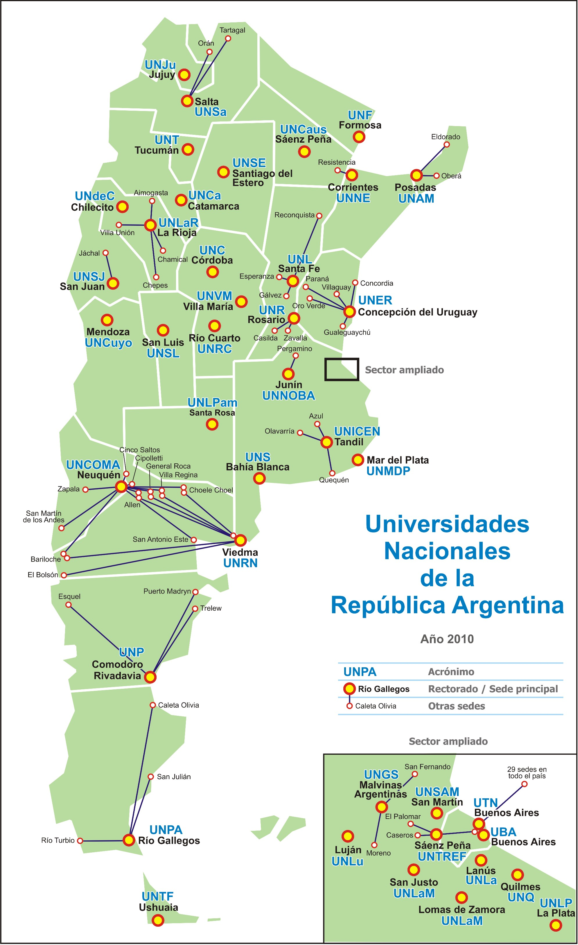 Localización de las universidades nacionales de Argentina en el año 2010.